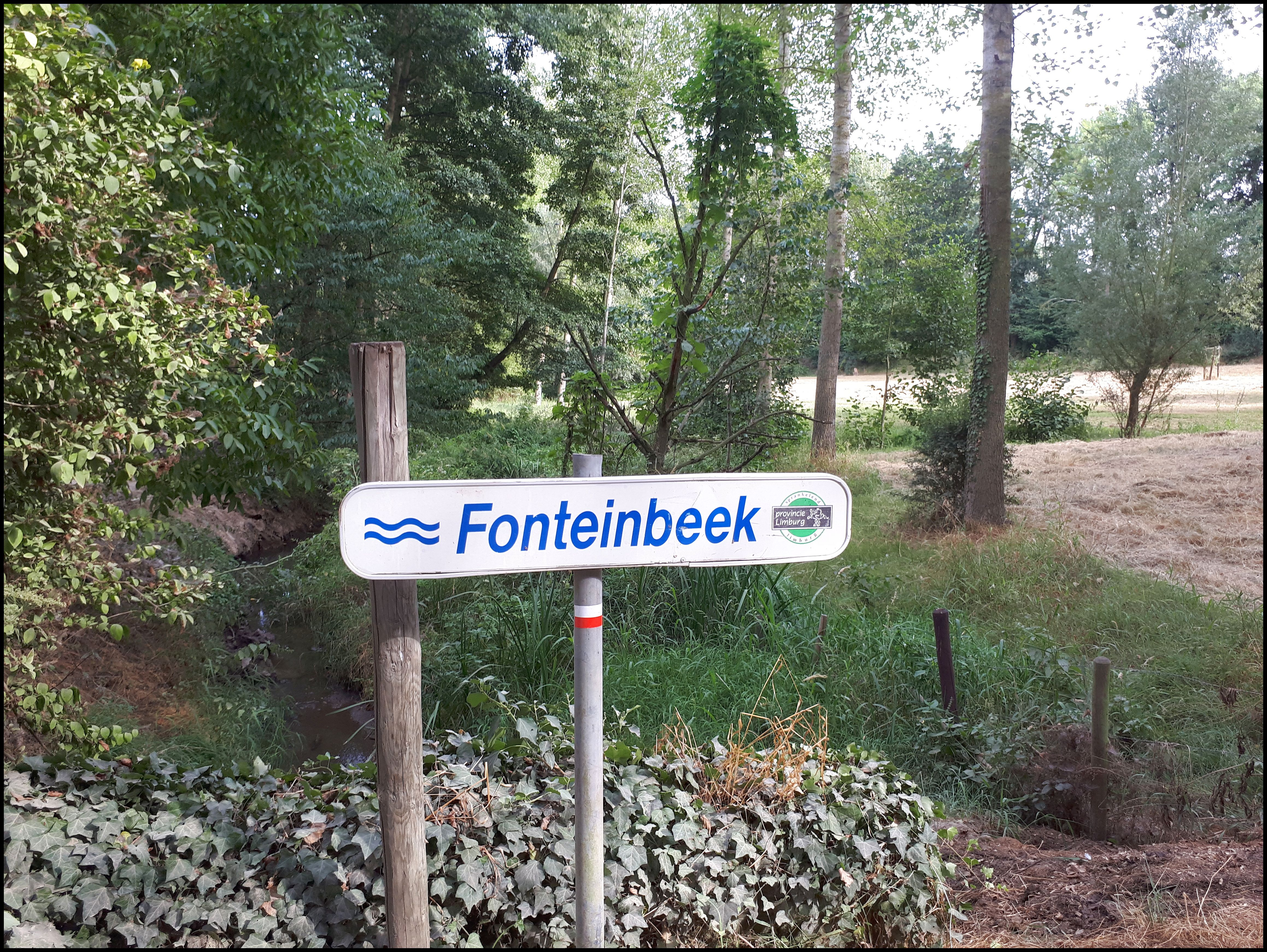 Vlaanderenroute steekt over de Fonteinbeek hier